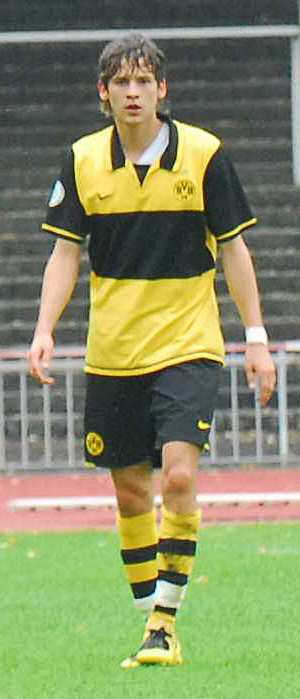 Nico Hillenbrandt